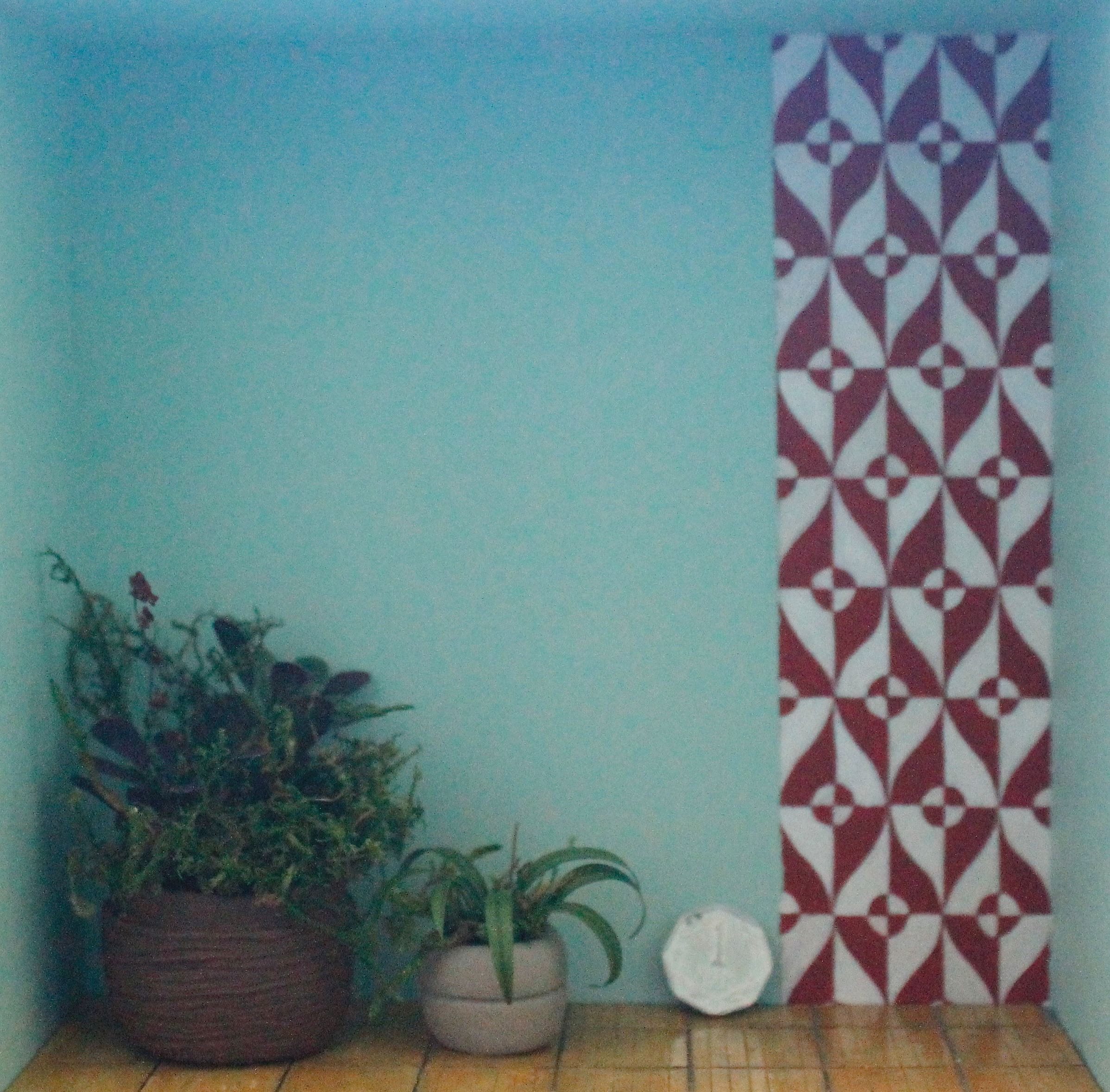 Diorama miniatura Financiado por fondar